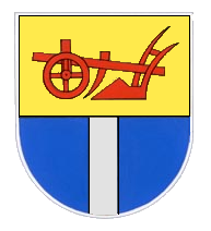 Wappen der Gemeinde Schwall